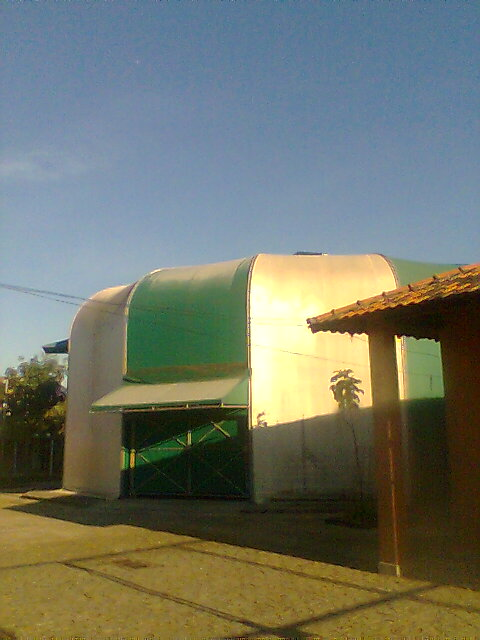 Foto da Lona Cultural Sandra de Sá